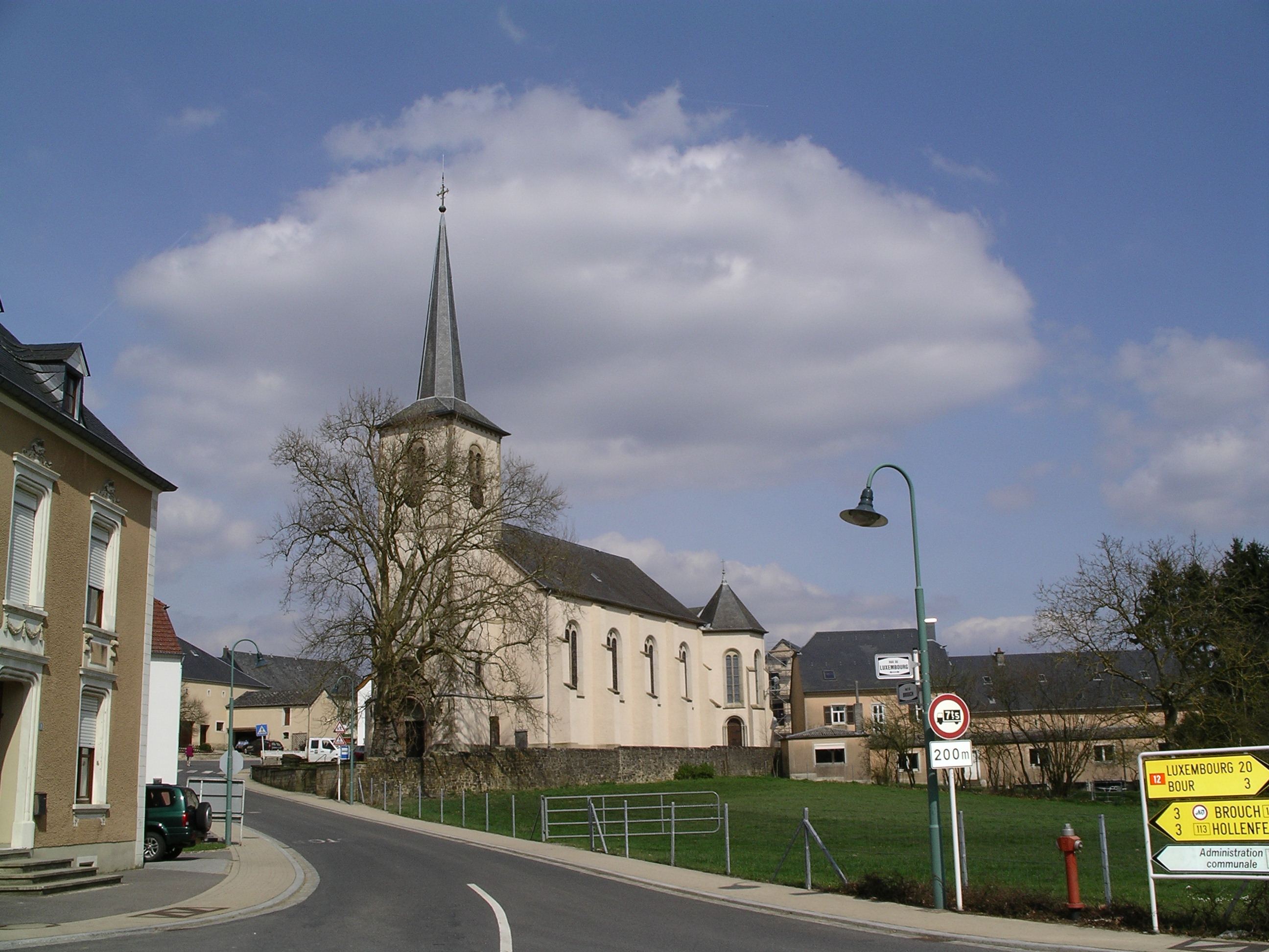 Blick auf Kirche von Tuntange, Gemeinde in Luxemburg.